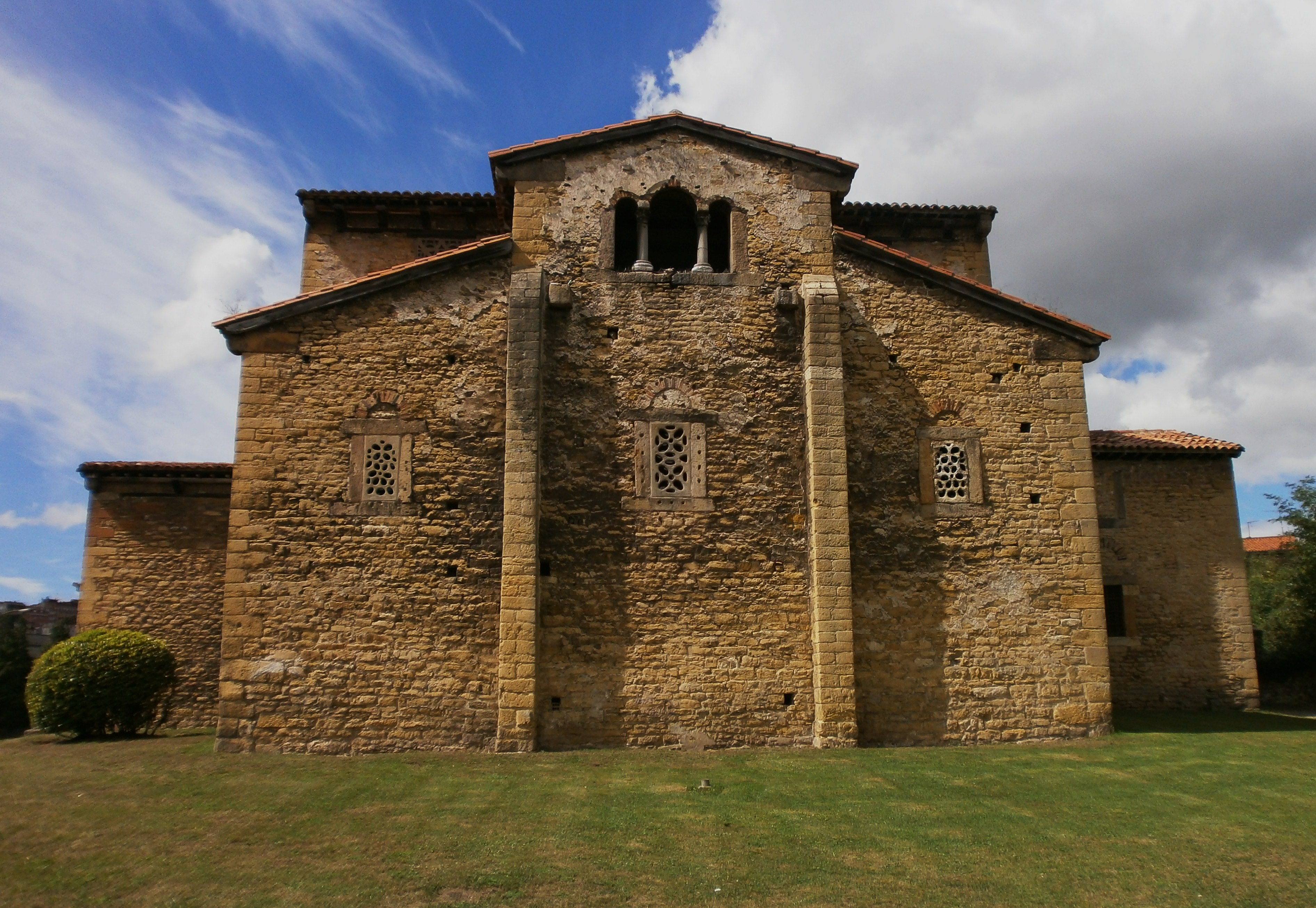 Iglesia de San Julián de los Prados vista desde levante